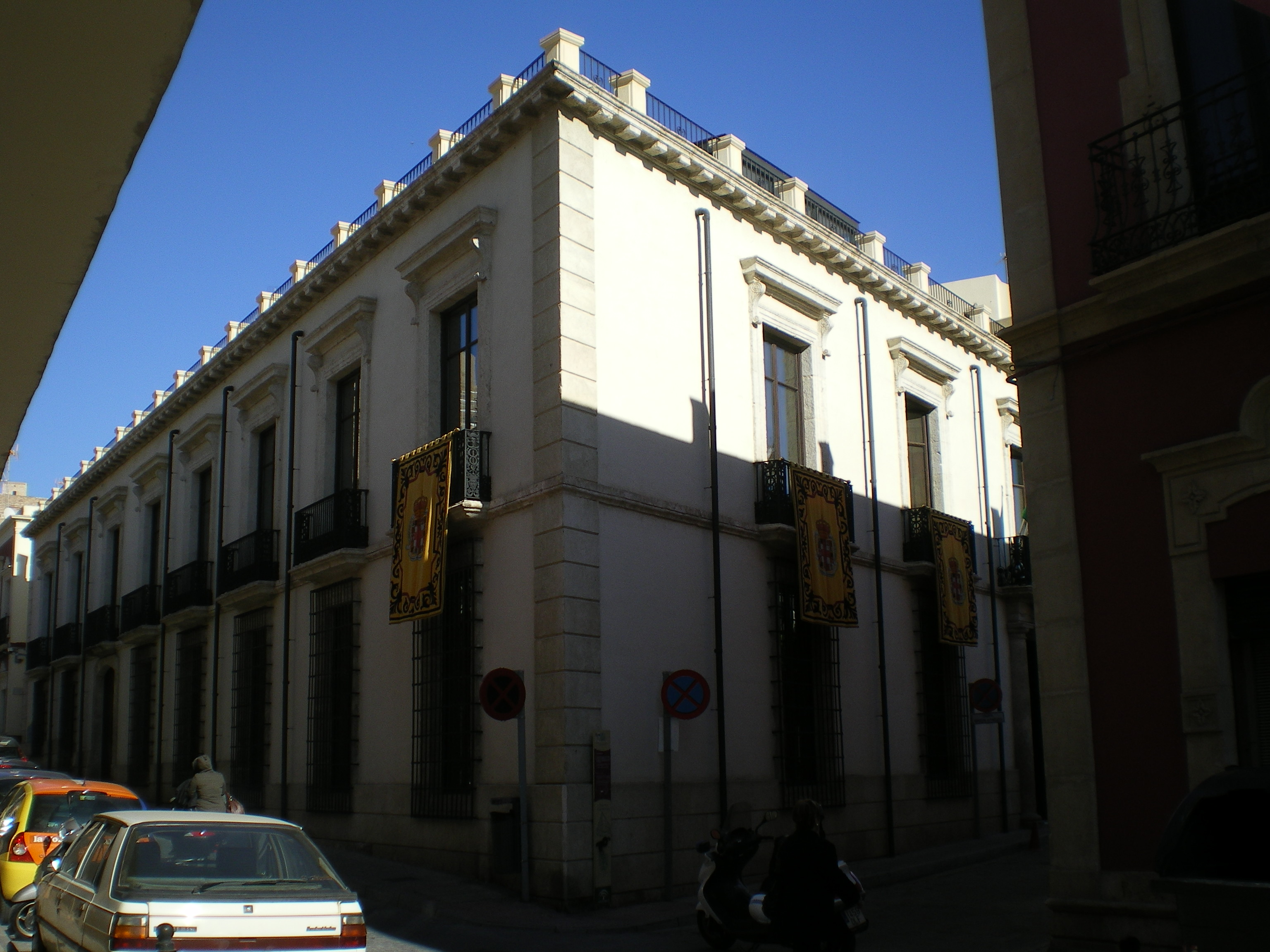 Fotografía fachadas sur y oeste del Palacio de los marqueses de Cabra en Almería, Andalucía, España.